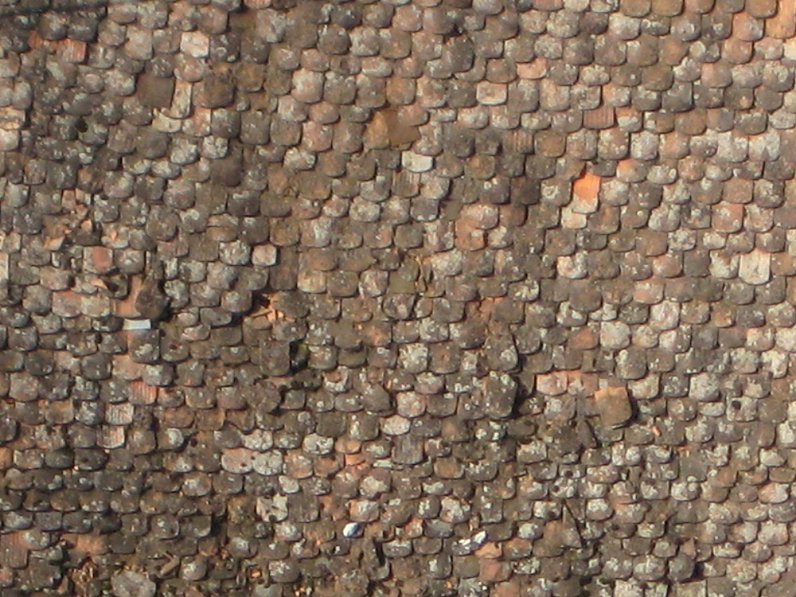 Alte Biberschwanz-Doppeldeckung auf einer Hausruine in Hermannstadt, Rumänien